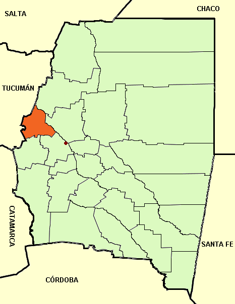 Mapa editado de: Santiago del Estero province (Argentina), departments and capital.png